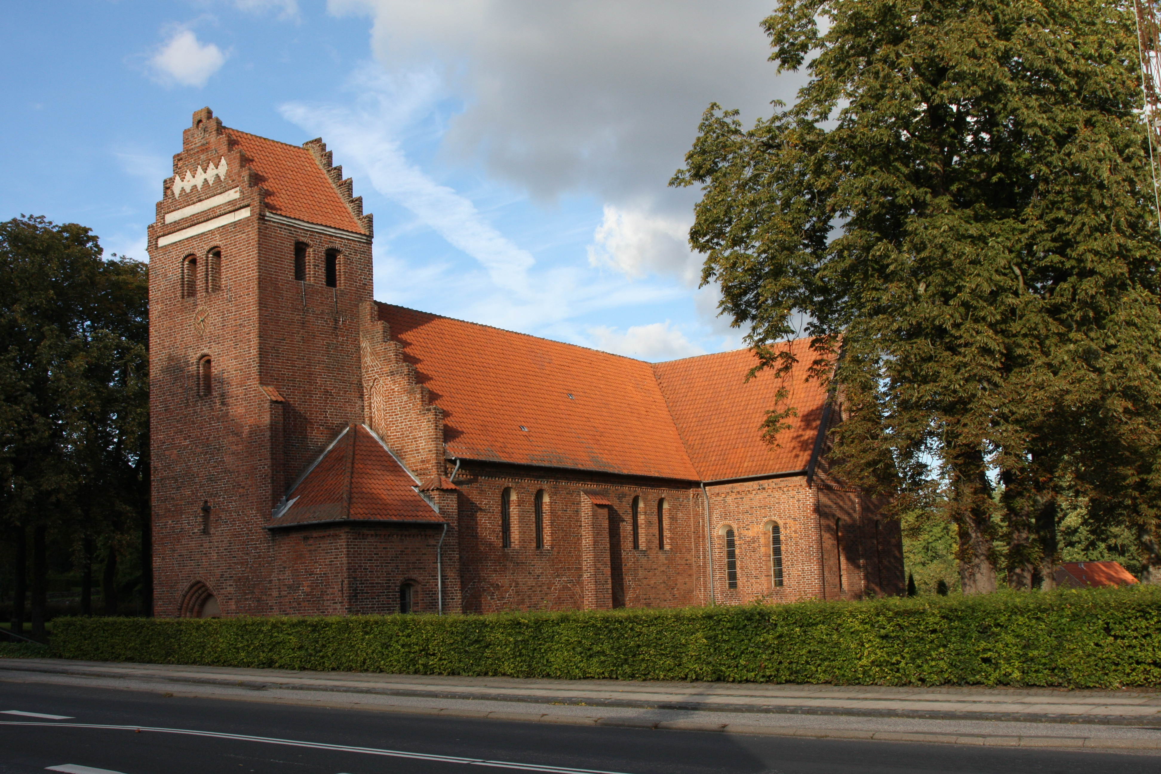 Dalum Kirke, Odense, Danmark.